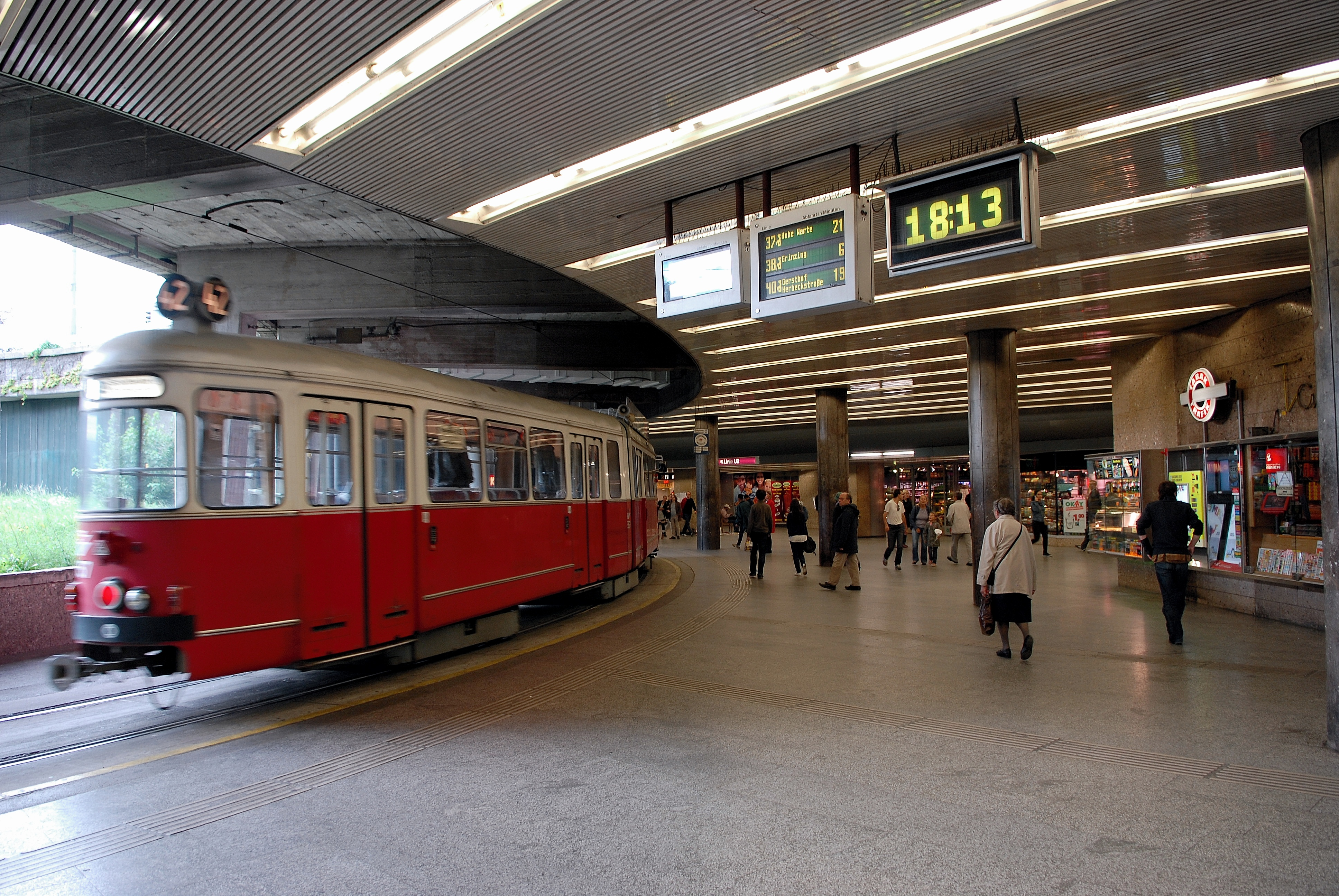 Jonasreindl, Untergeschoss, 2012